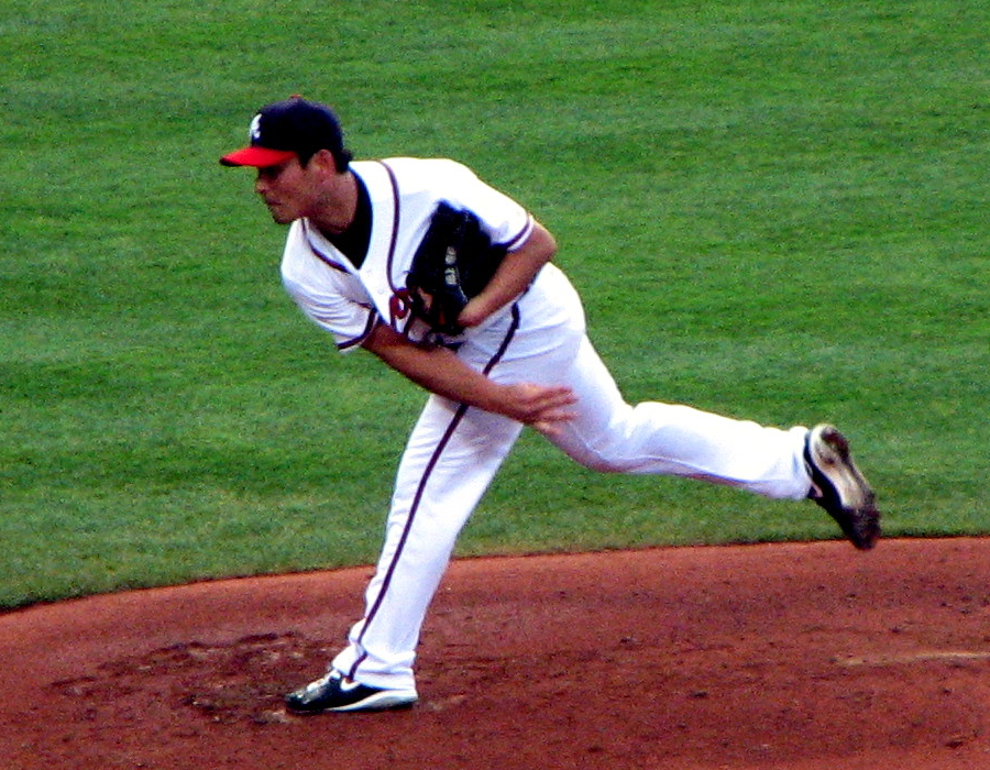 Kenshin Kawakami